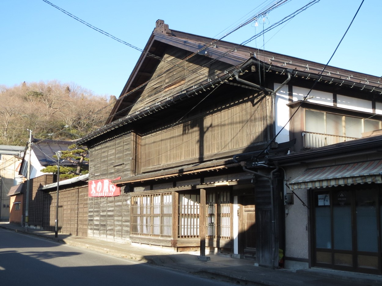 宮古市にある旧東家酒店 Canon IXY 3